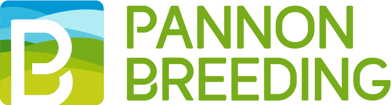 Pannonbreeding projekt logo